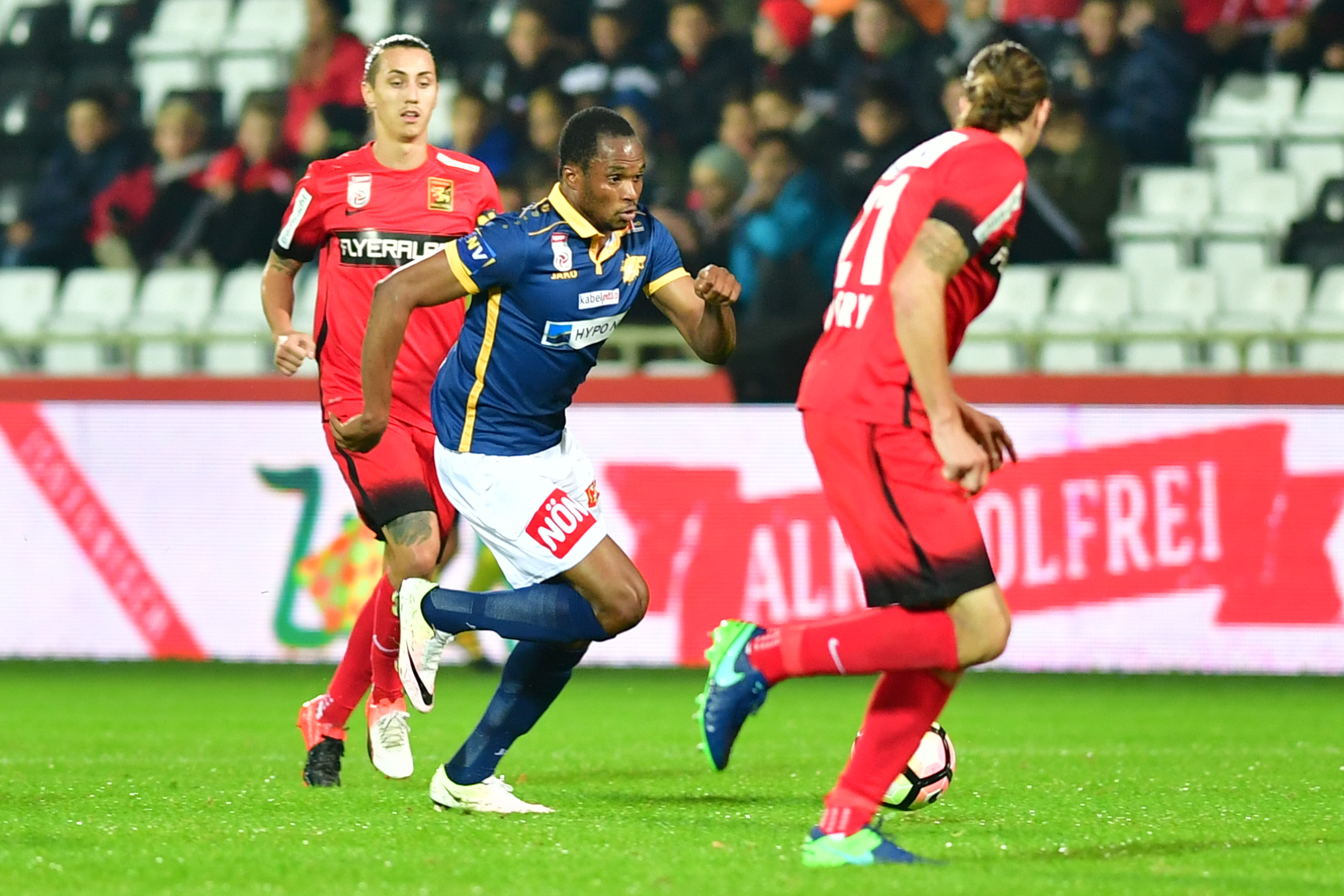 Fußball Bundesliga - FC Admira Wacker Mödling vs SKN St. Pölten. Bild zeigt Alhassane Keita (SKN).